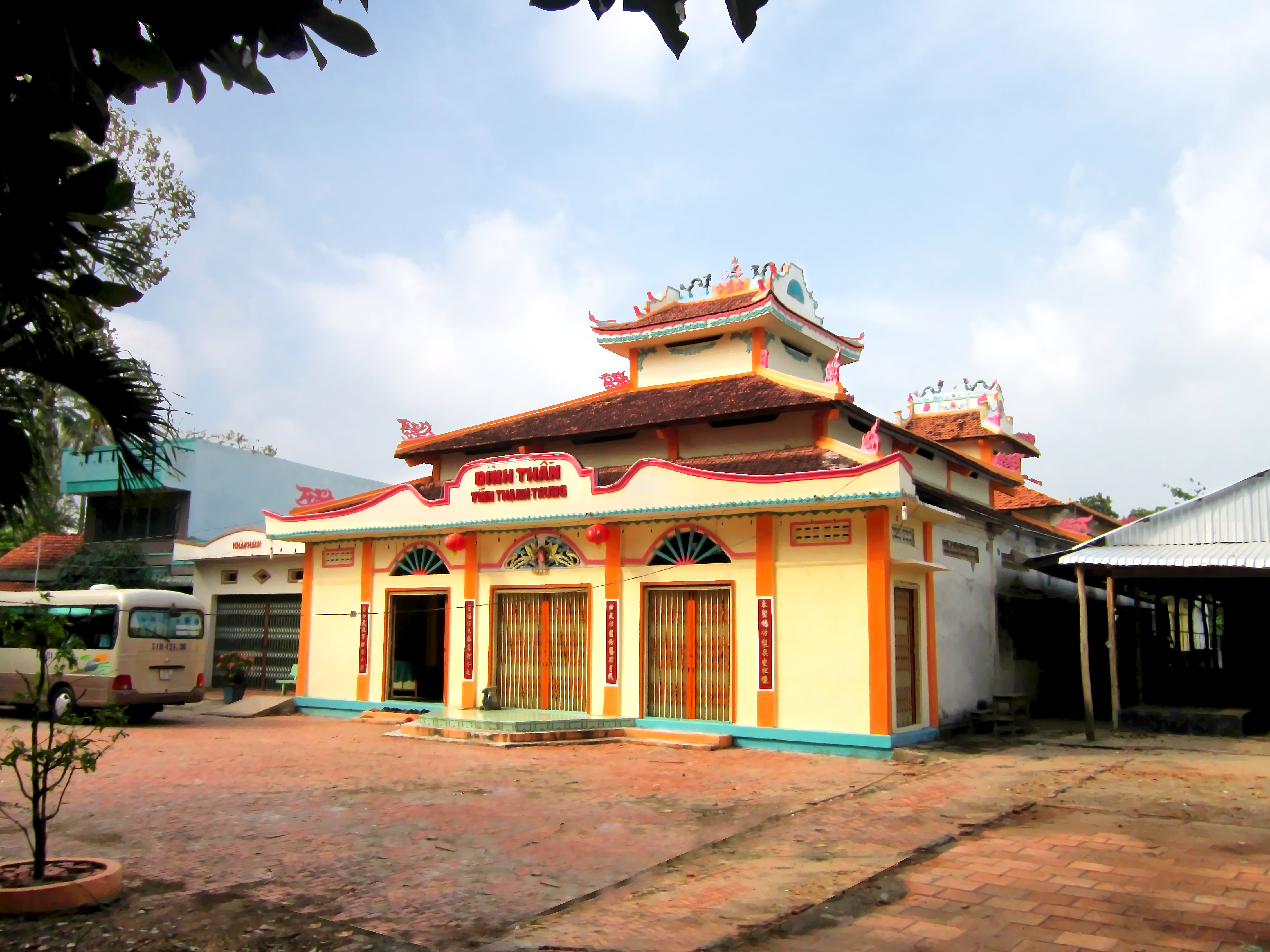 Đình thần Vĩnh Thạnh Trung, thuộc xã Vĩnh Thạnh Trung, huyện Châu Phú, tỉnh An Giang, Việt Nam.